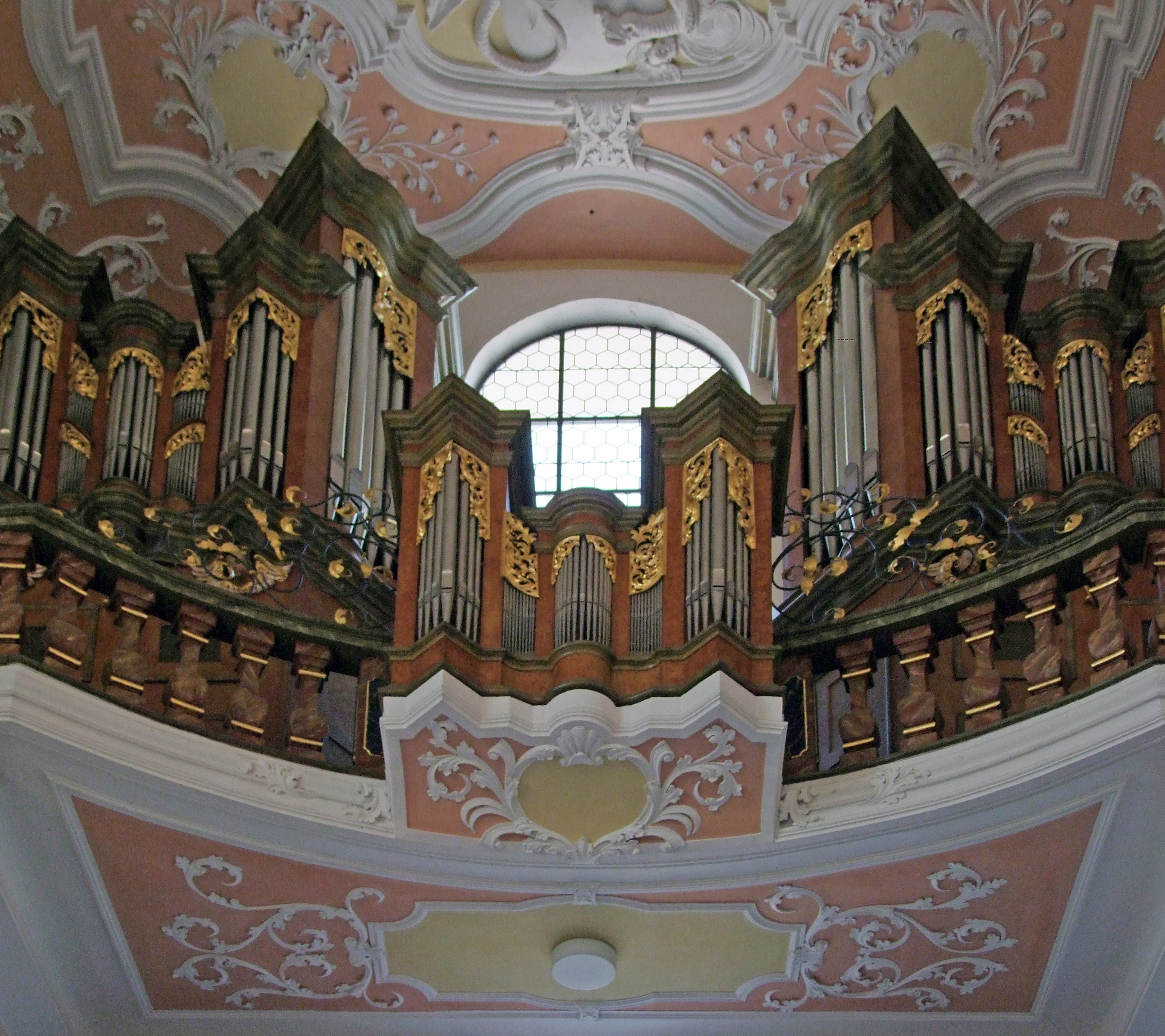 Mariä Verkündigung im oberschwäbischen Mindelheim. Ehemalige Augustiner, dann Jesuitenklosterkirche.